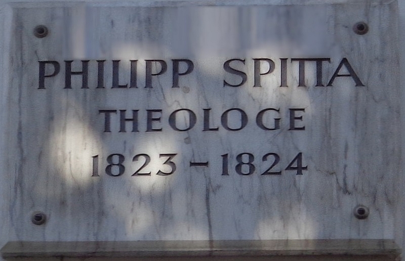 Göttinger Gedenktafel für Carl Johann Philipp Spitta (Weender Straße 57)